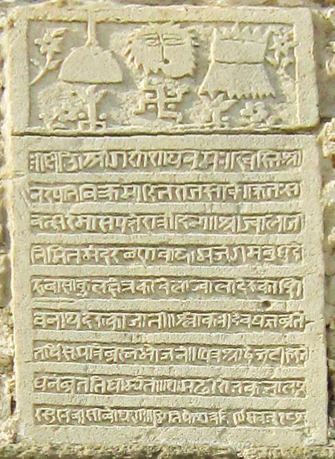 Atəşgah altarında sankrit və hindistani dillərində kitabə